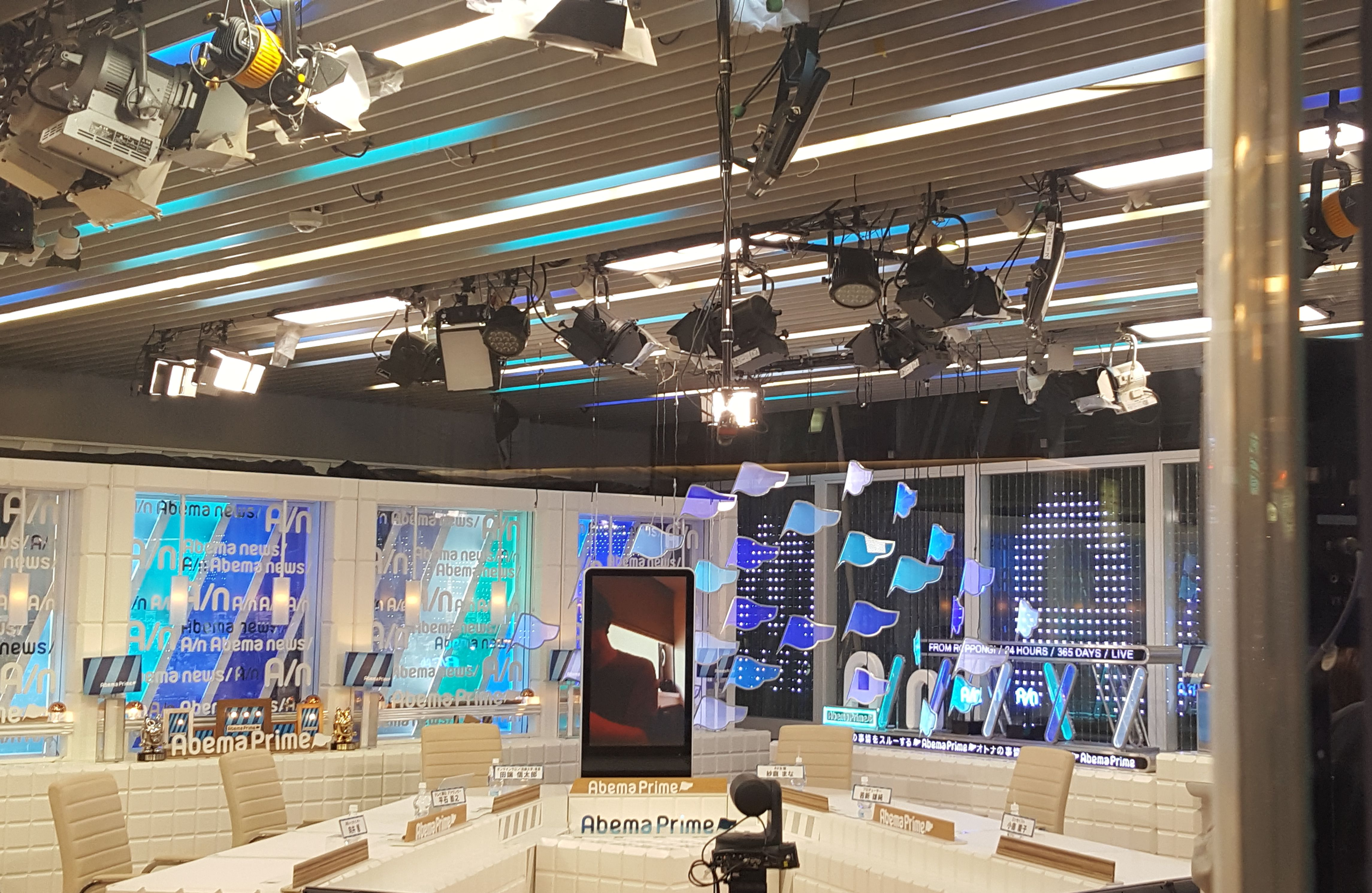 AbemaPrime